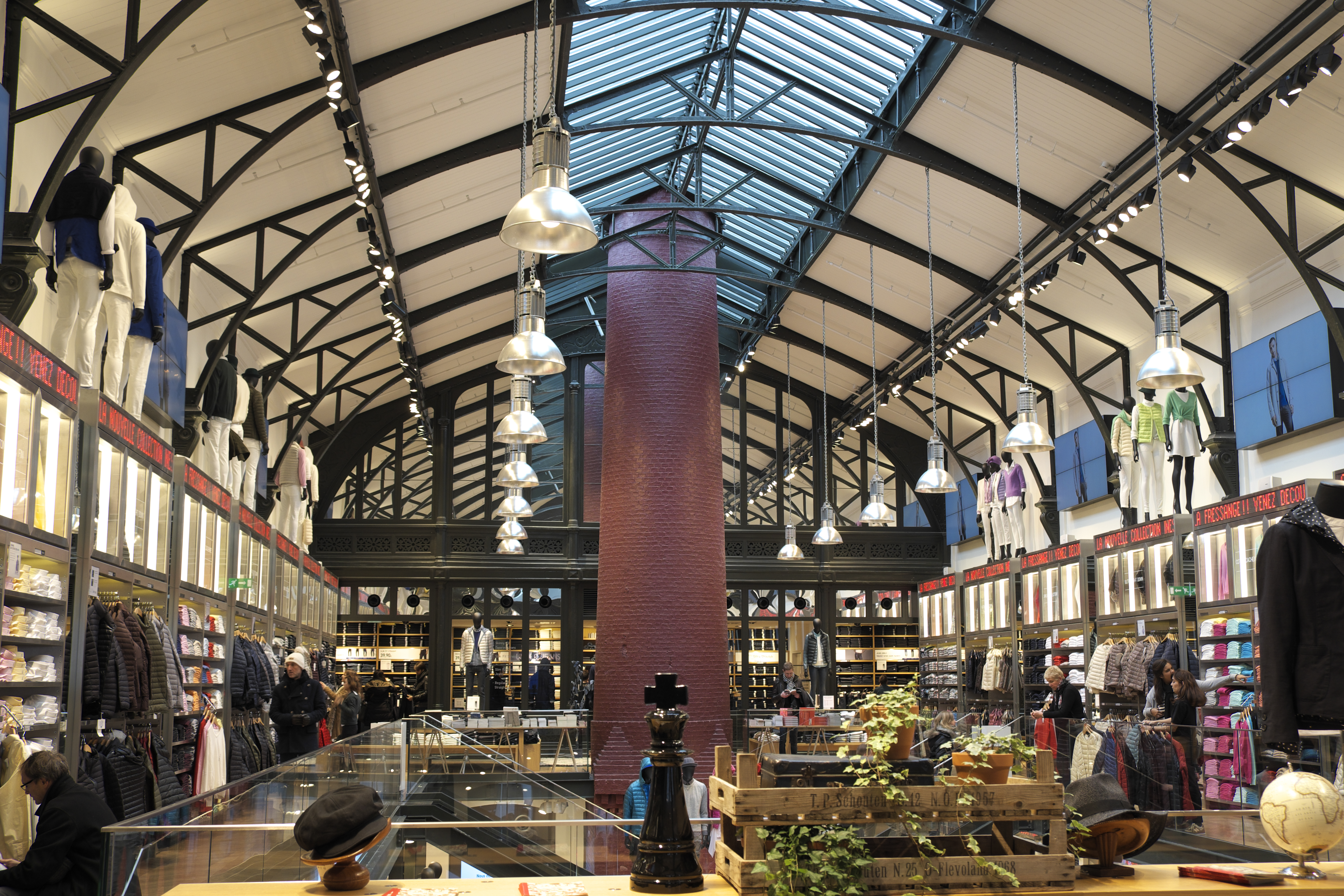 Ehemaliges Gebäude der Société des Cendres in der Rue des Francs-Bourgeois Nr. 39 im 4. Arrondissement in Paris, in dem seit 2014 ein Modegeschäft eingerichtet ist